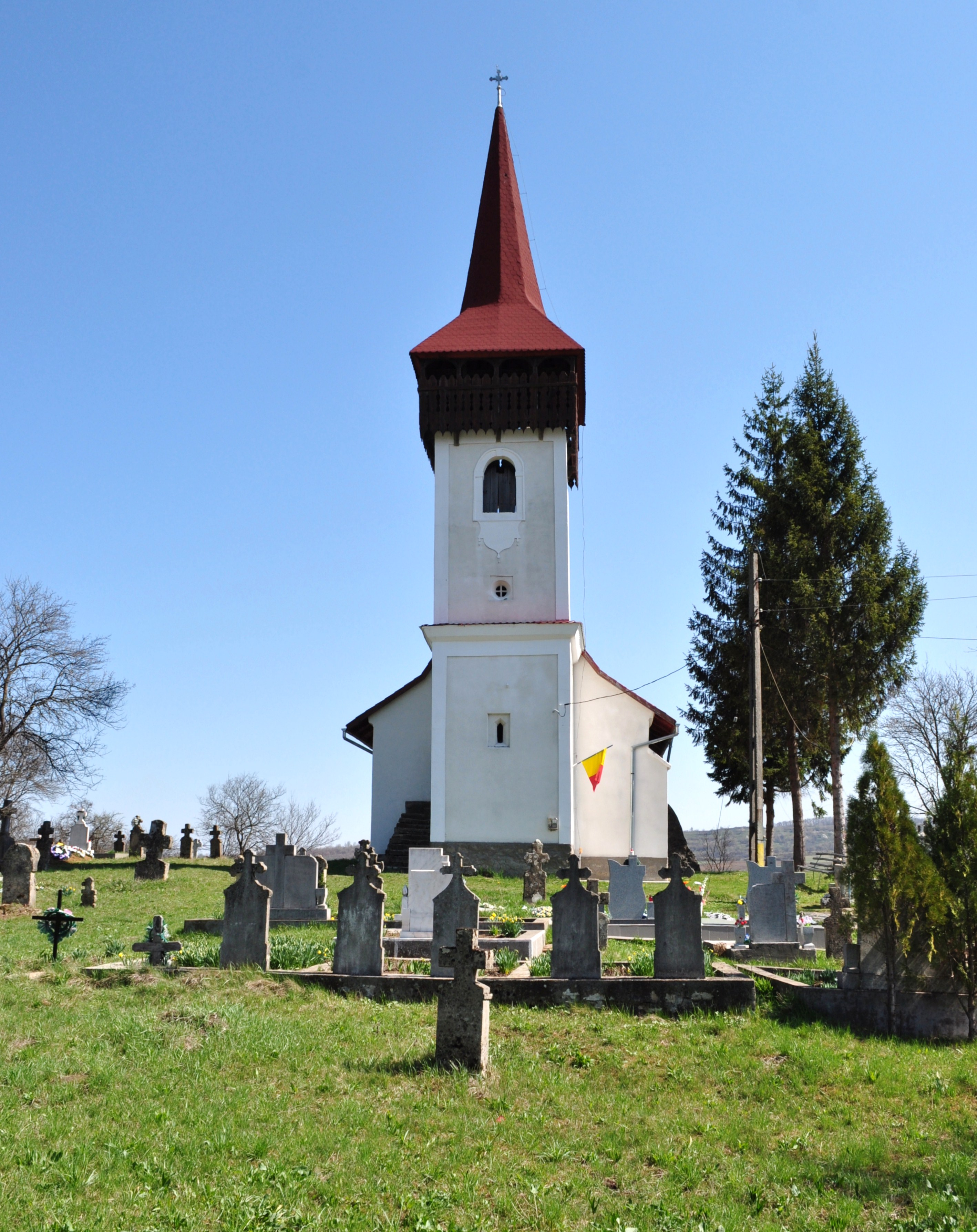 Biserica "Buna Vestire", sat ROŞCANI; comuna DOBRA